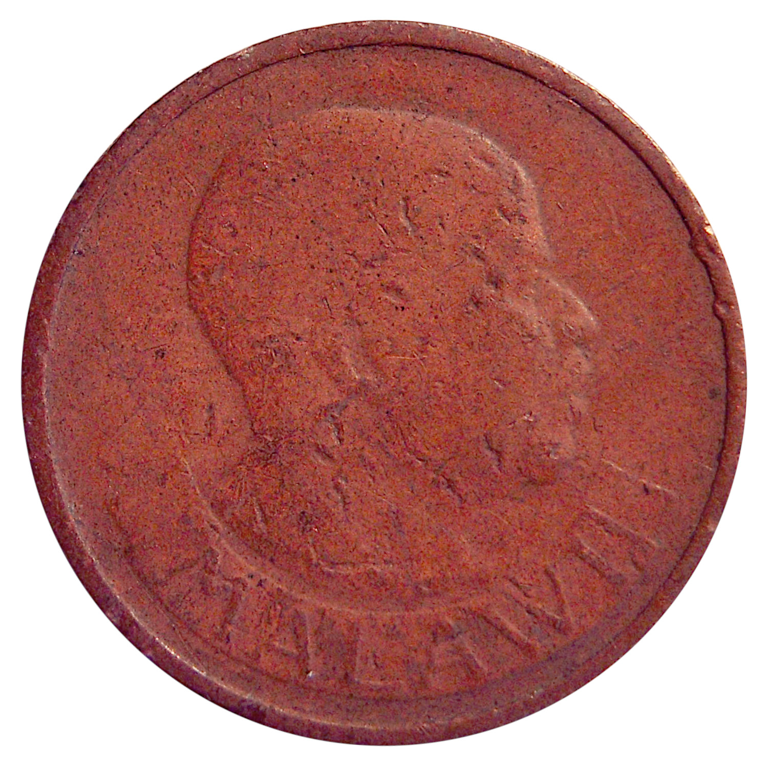 Revers d'une pièce de 1 Tambala (Kwacha Malawien) datant de 1971.